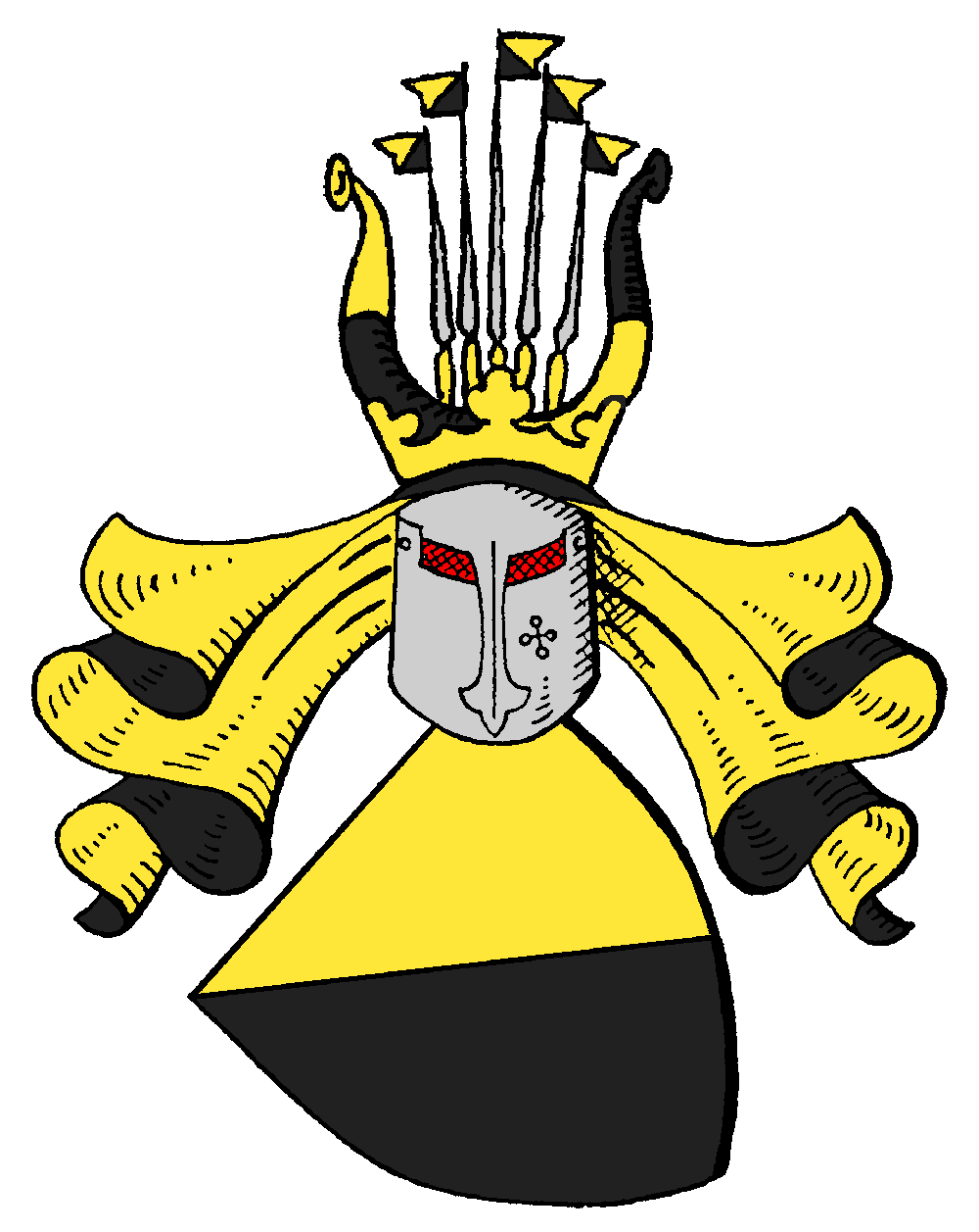 Stammwappen der von Stiellfried